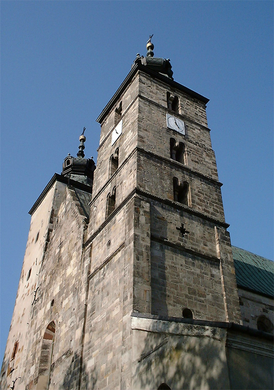 Opatów kolegiata - romańska wieża południowa